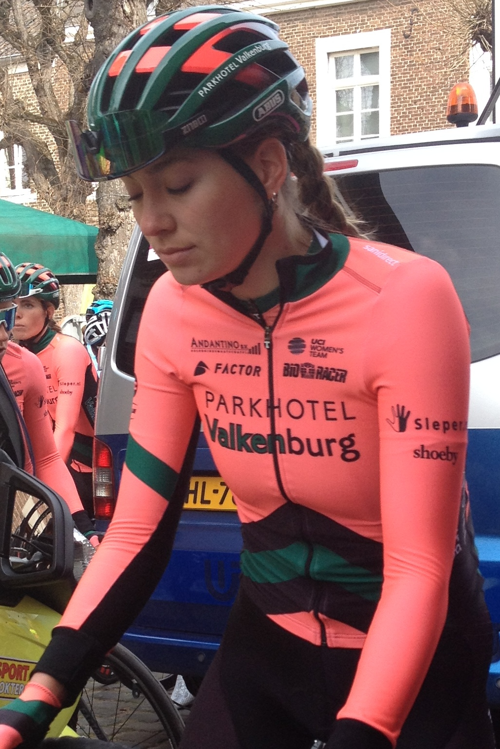 Volta Limburg Classic 2019 voor vrouwen met start en finish in Eijsden, Limburg, Nederland